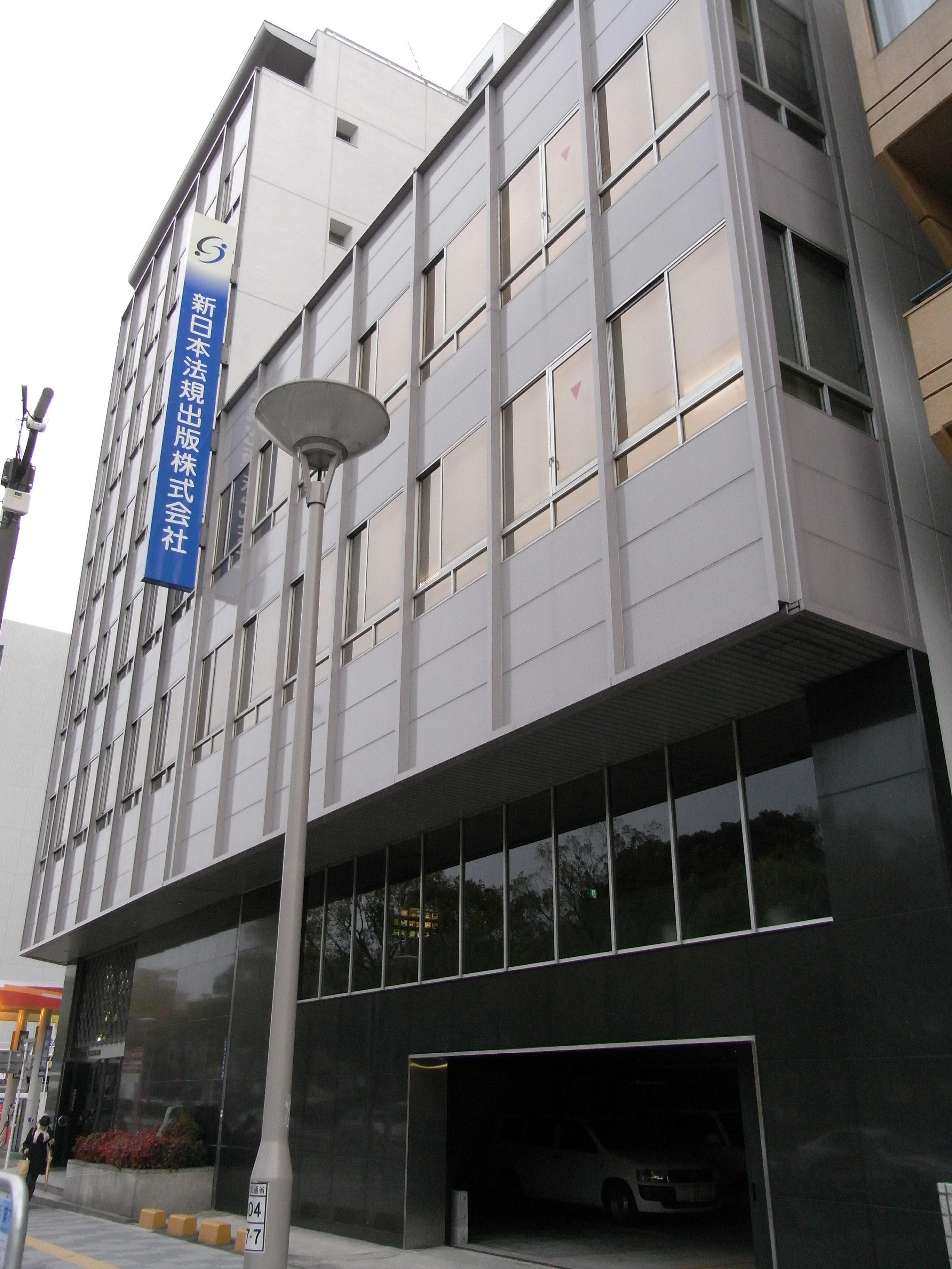 愛知県名古屋市中区新日本法規出版本社総轄本部